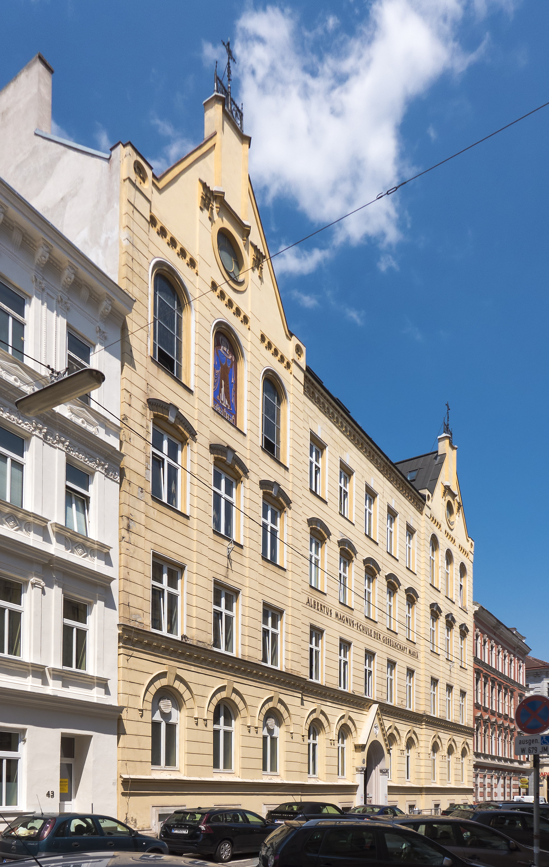 Albertus-Magnus-Schule Wien in Wien 18